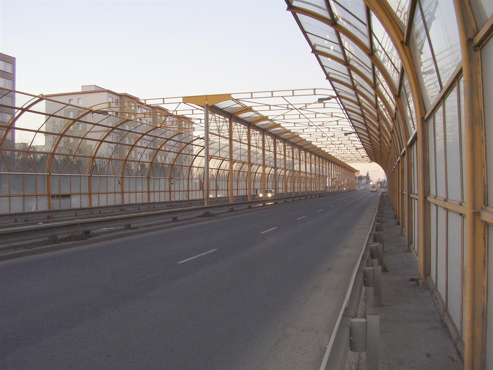 Slánská ulice v Řepích v Praze s protihlukovou bariérou